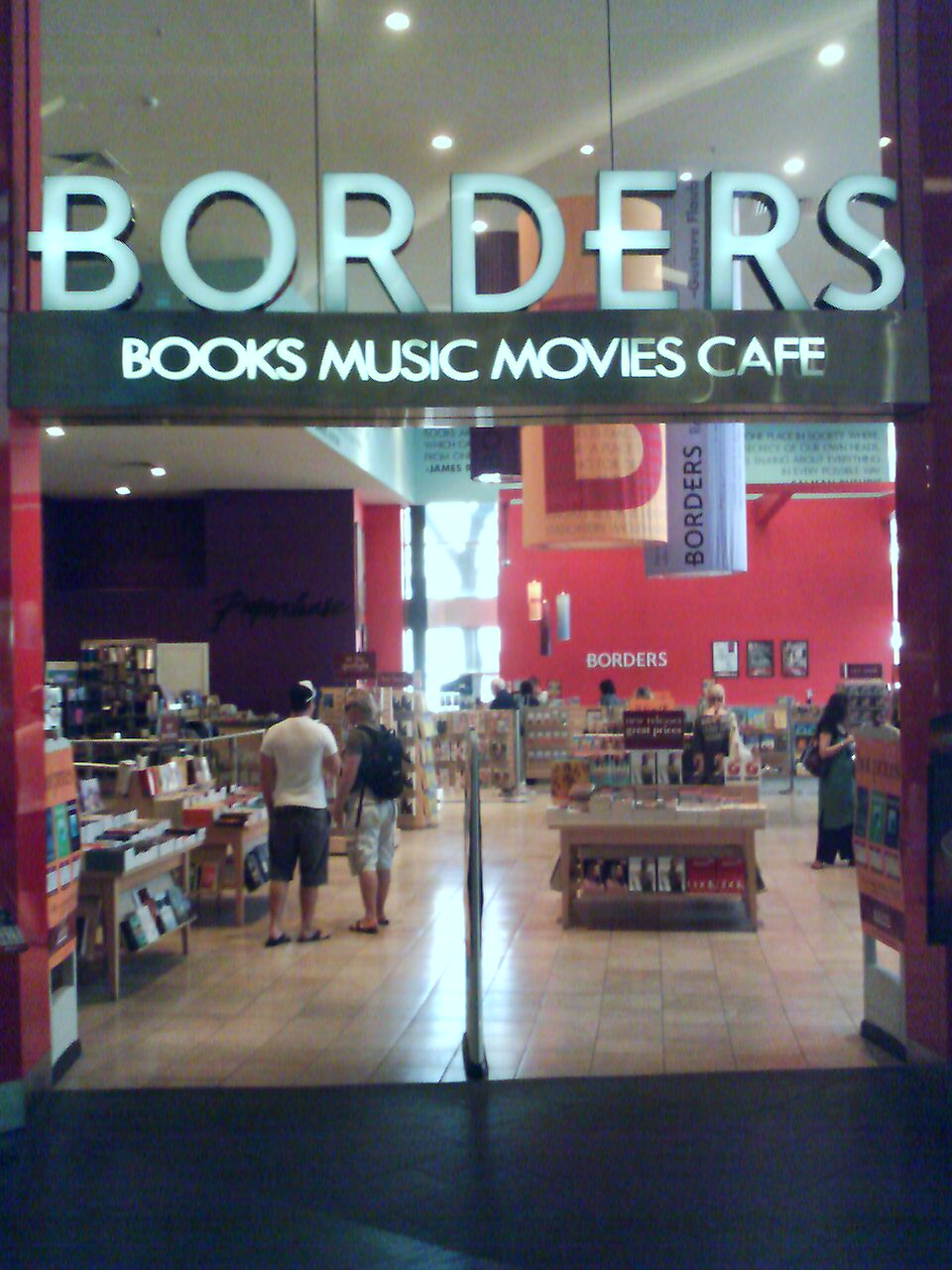 Borders Buchhandlung in Sydney/Bondi